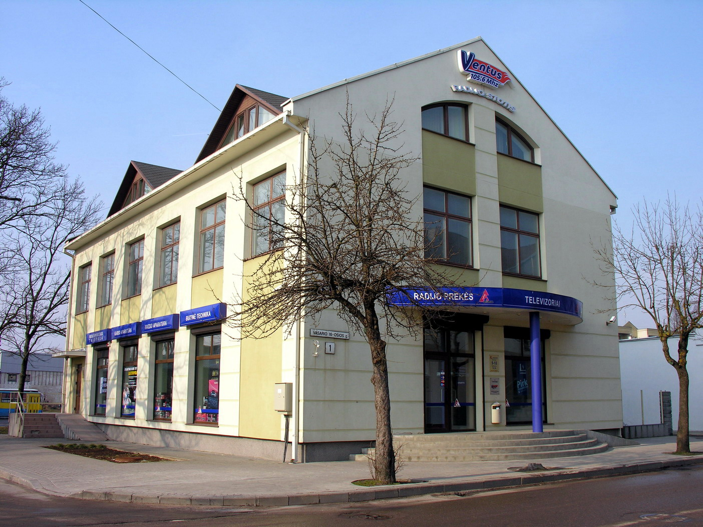 Ventus 2007-03-08, Lietuva